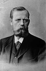 Ignaz Auer (1846-1907)